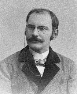 Joseph von Pestalozza (1868-1930), Graf und bayerischer Landtagsabgeordneter, NS-Gegner und katholischer Aktivist